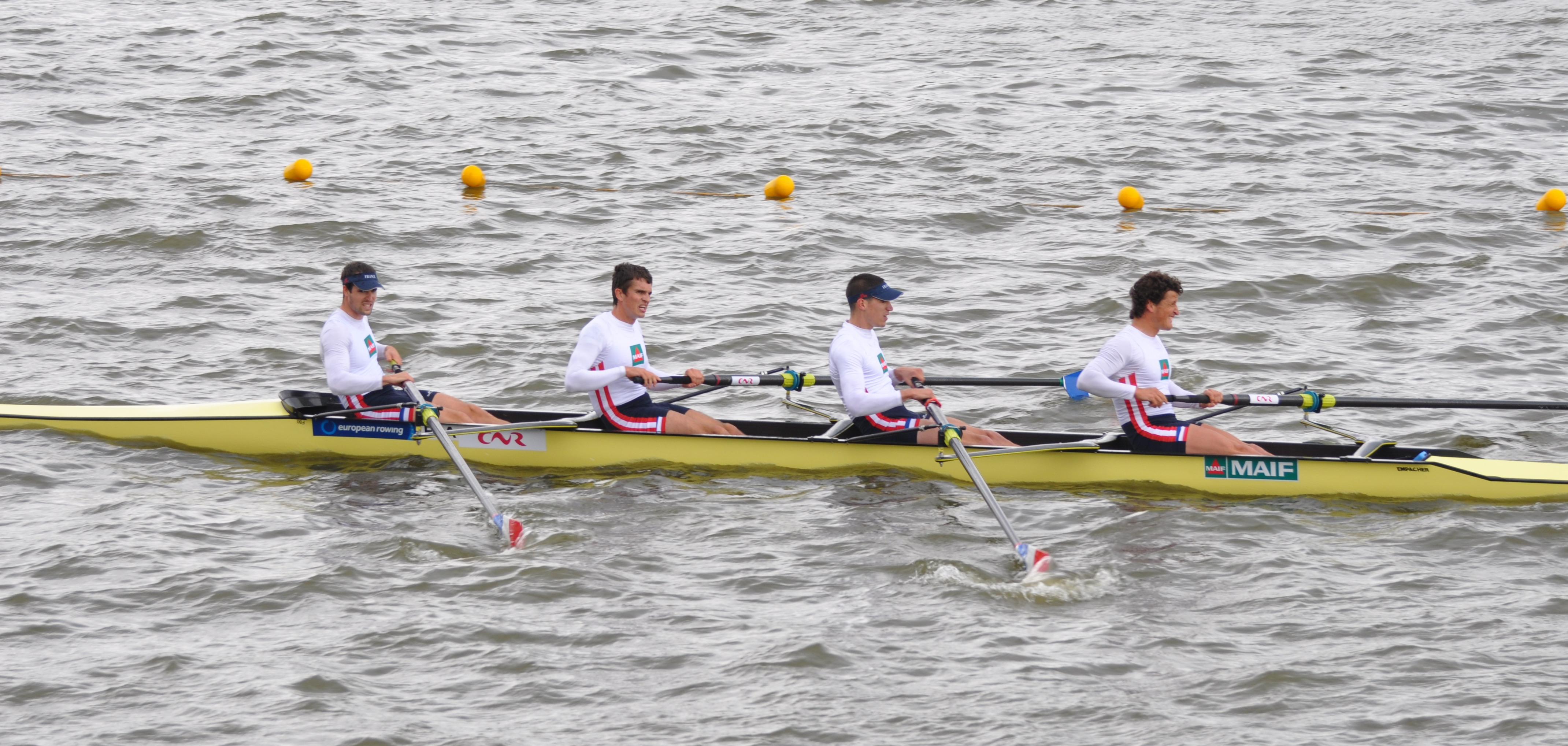 Quatre de pointe français, à Poznan 2015, lors des Championnats d'Europe